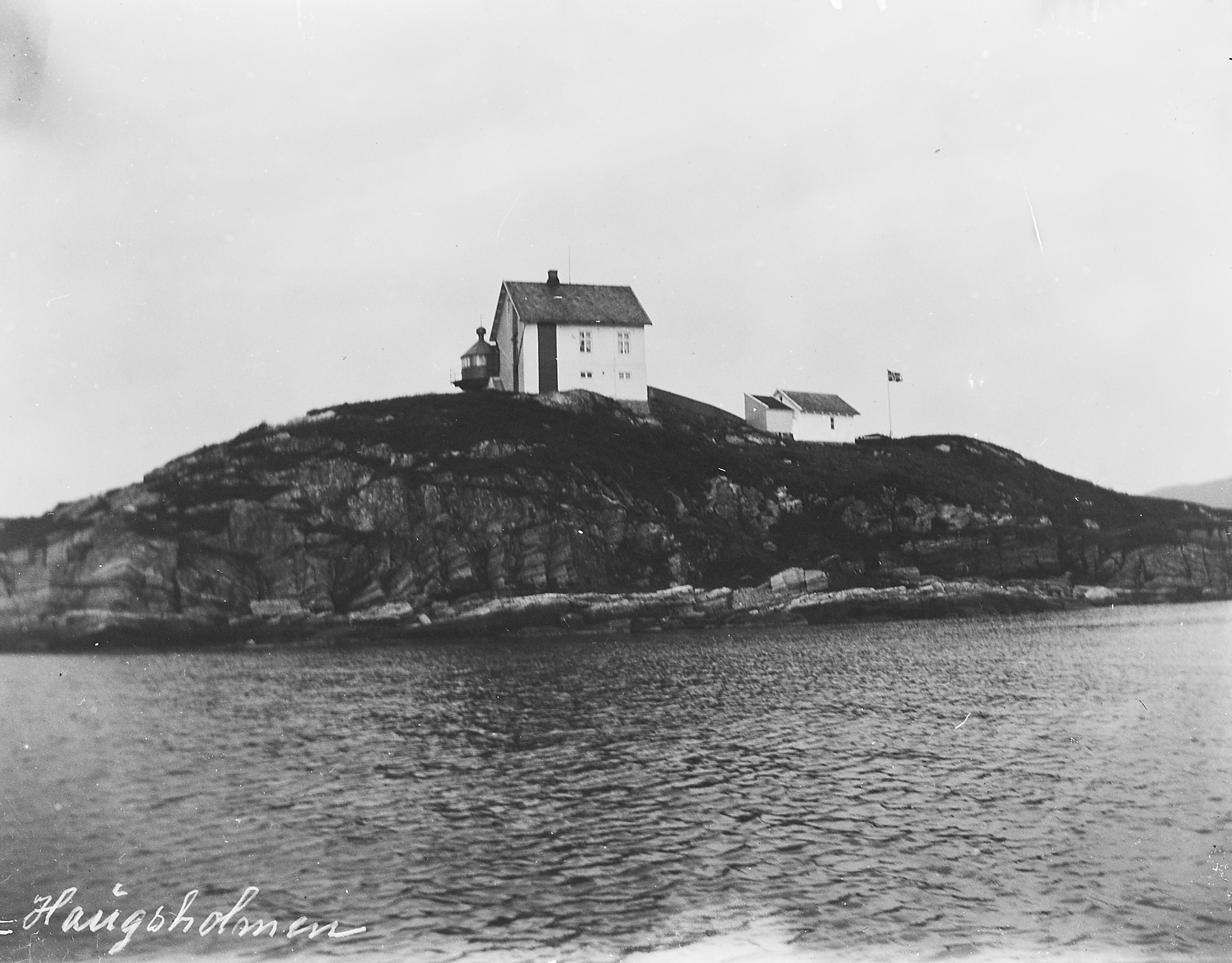 Bildet er hentet fra Arkivverket. Haugsholmen, Sande, Møre og Romsdal Arkivinstitusjon : Riksarkivet Arkivnavn : Fyrdirektoratet Sted : Norge, Møre og Romsdal, Sande, Haugsholmen Emneord: Fyr, Kyst Avbildet